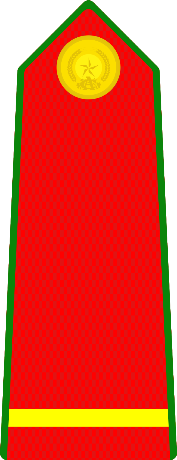 Cấp hiệu Hạ sĩ Công an